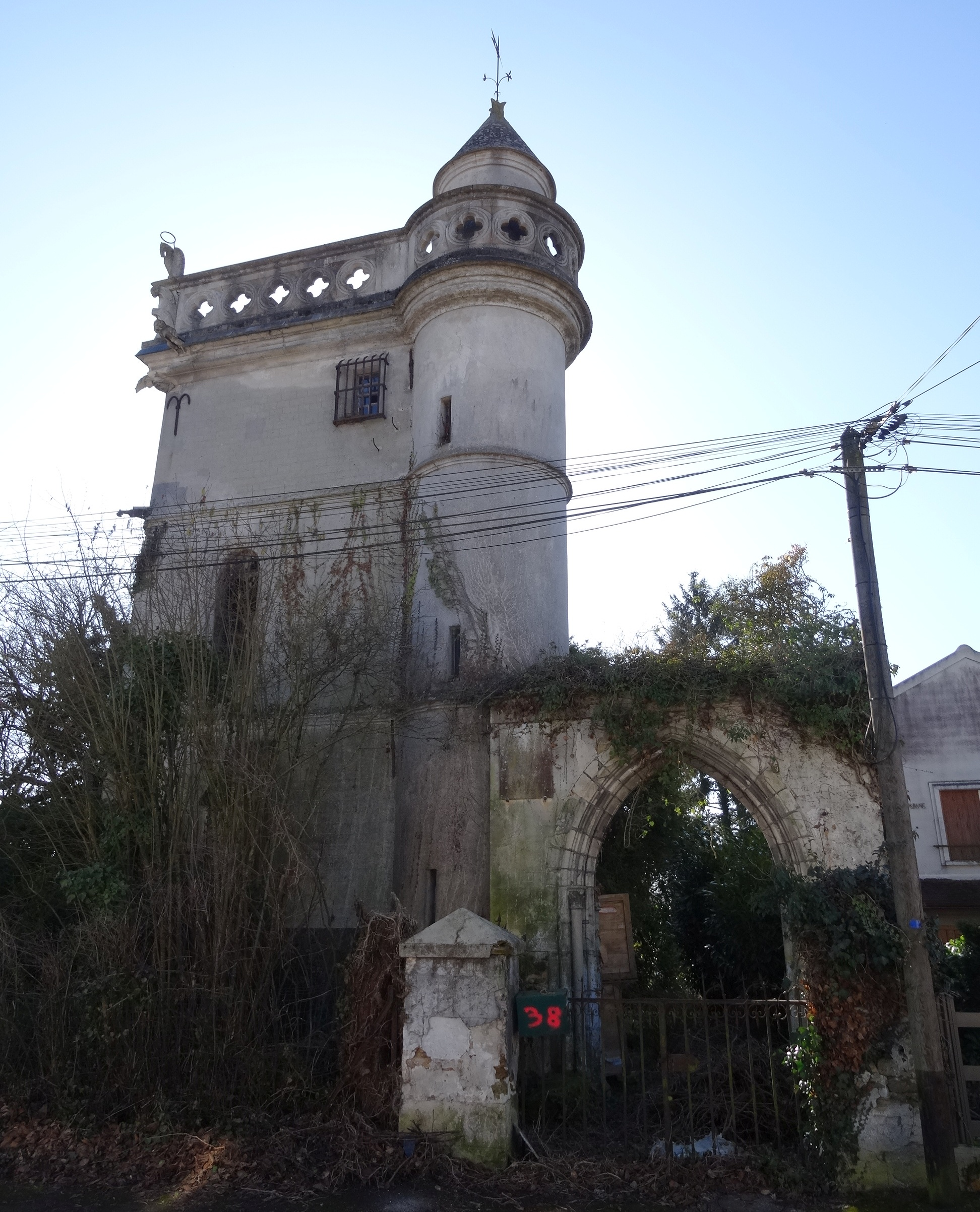 Tour d'Arcy, construite en 1896. (Chaumes-en-Brie, Seine-et-Marne, région Île-de-France).